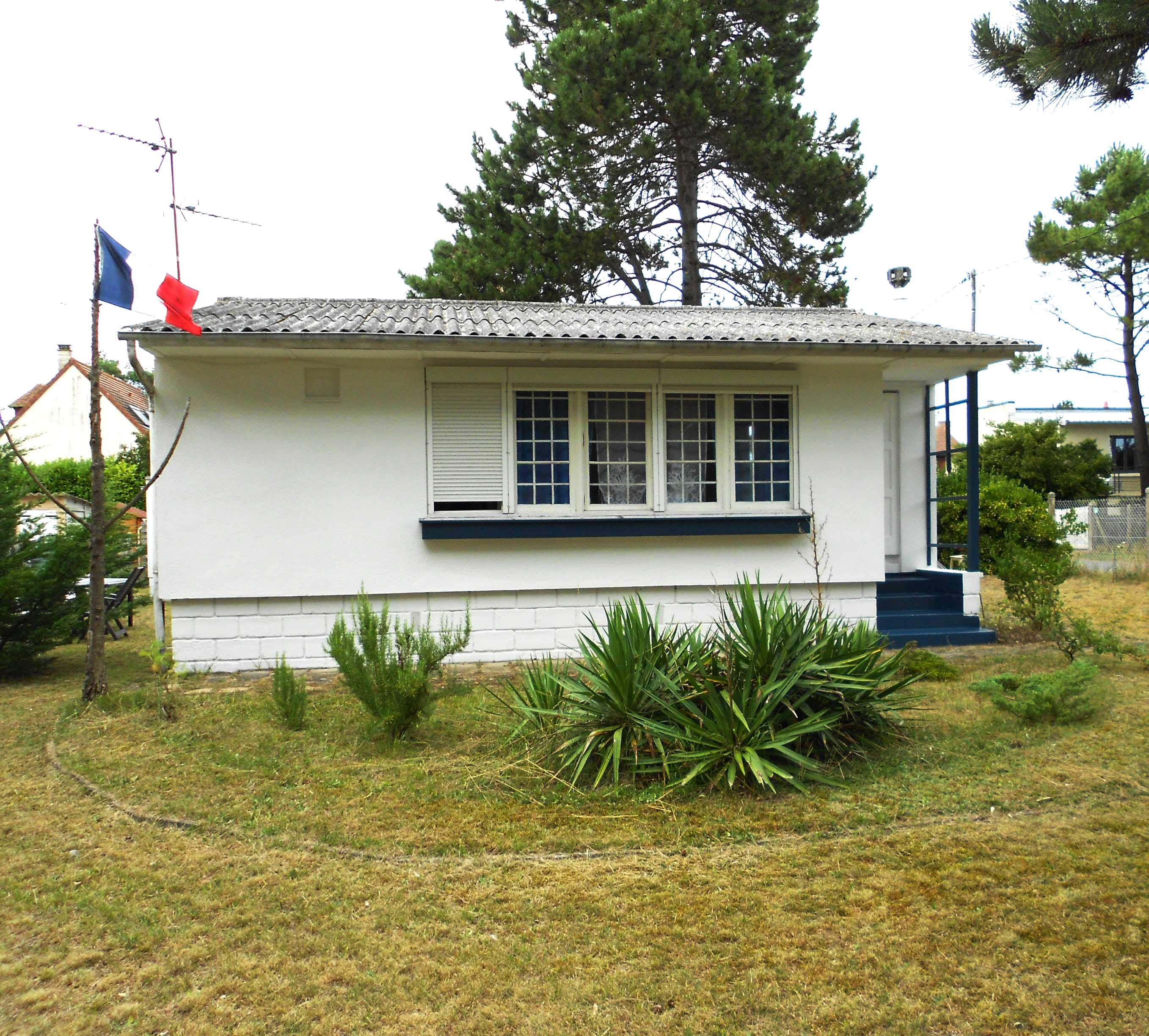 Bungalow américain UK 100 Le Home s/Mer commune de VARAVILLE (Calvados)